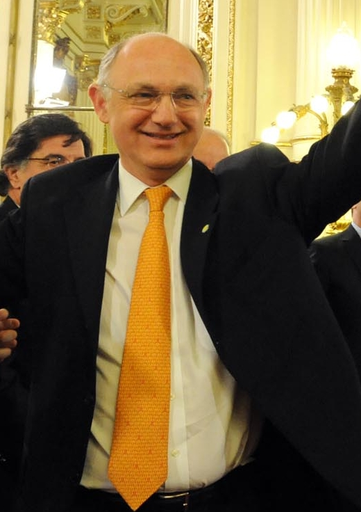 Héctor Timerman, peridosta argentino y actual canciller.